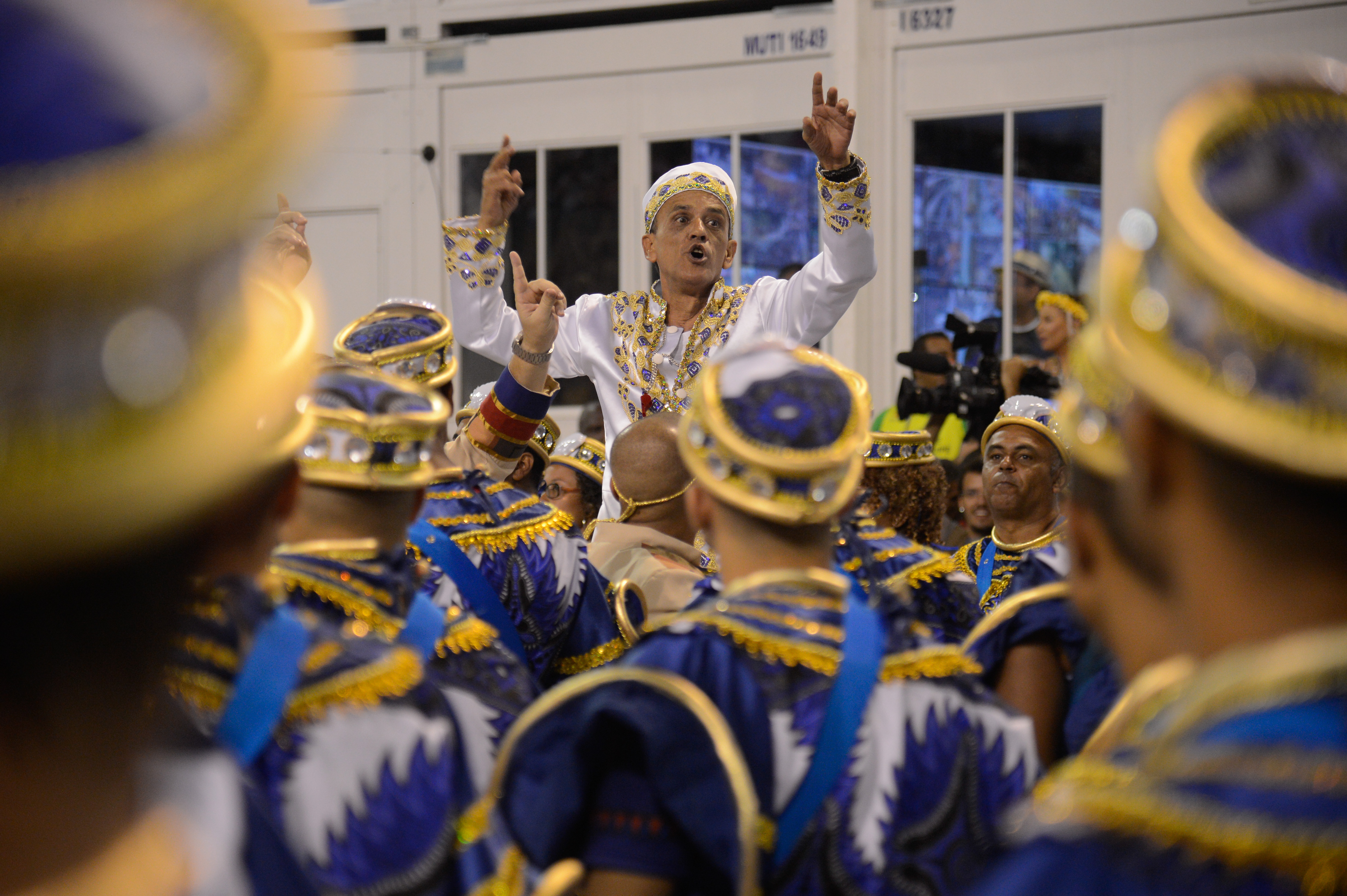 Rio de Janeiro - Desfile da escola de samba União da Ilha do Governador, pelo grupo especial, no Sambódromo (Fernando Frazão/Agência Brasil)